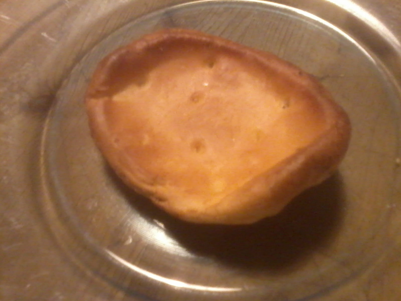 krakeno bretona